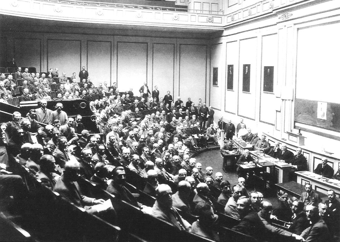 Langenbeck-Virchow-Haus in Berlin/Mitte, Auditorium